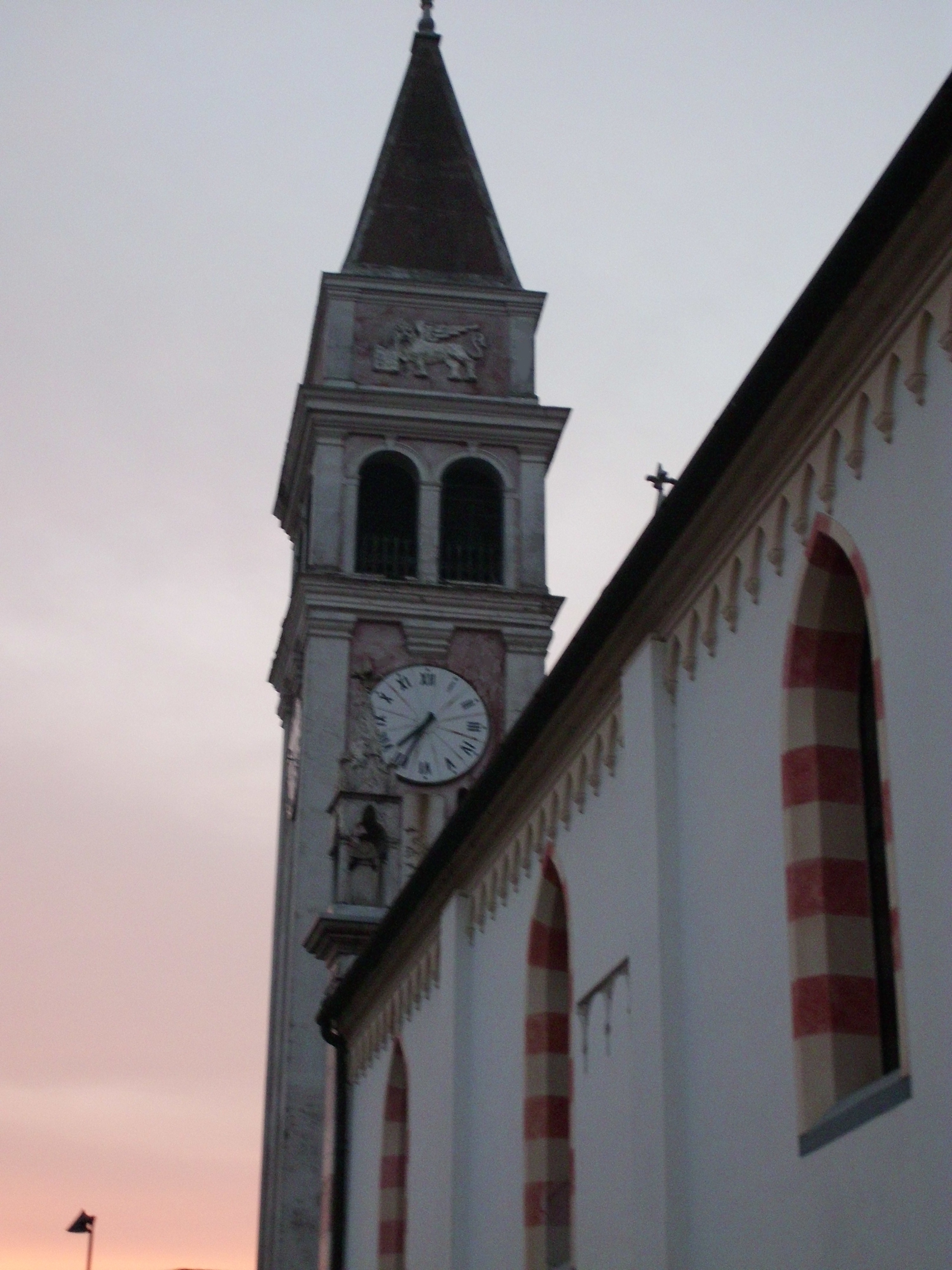 Veduta notturna della parrocchiale di Cappella di Scorzè